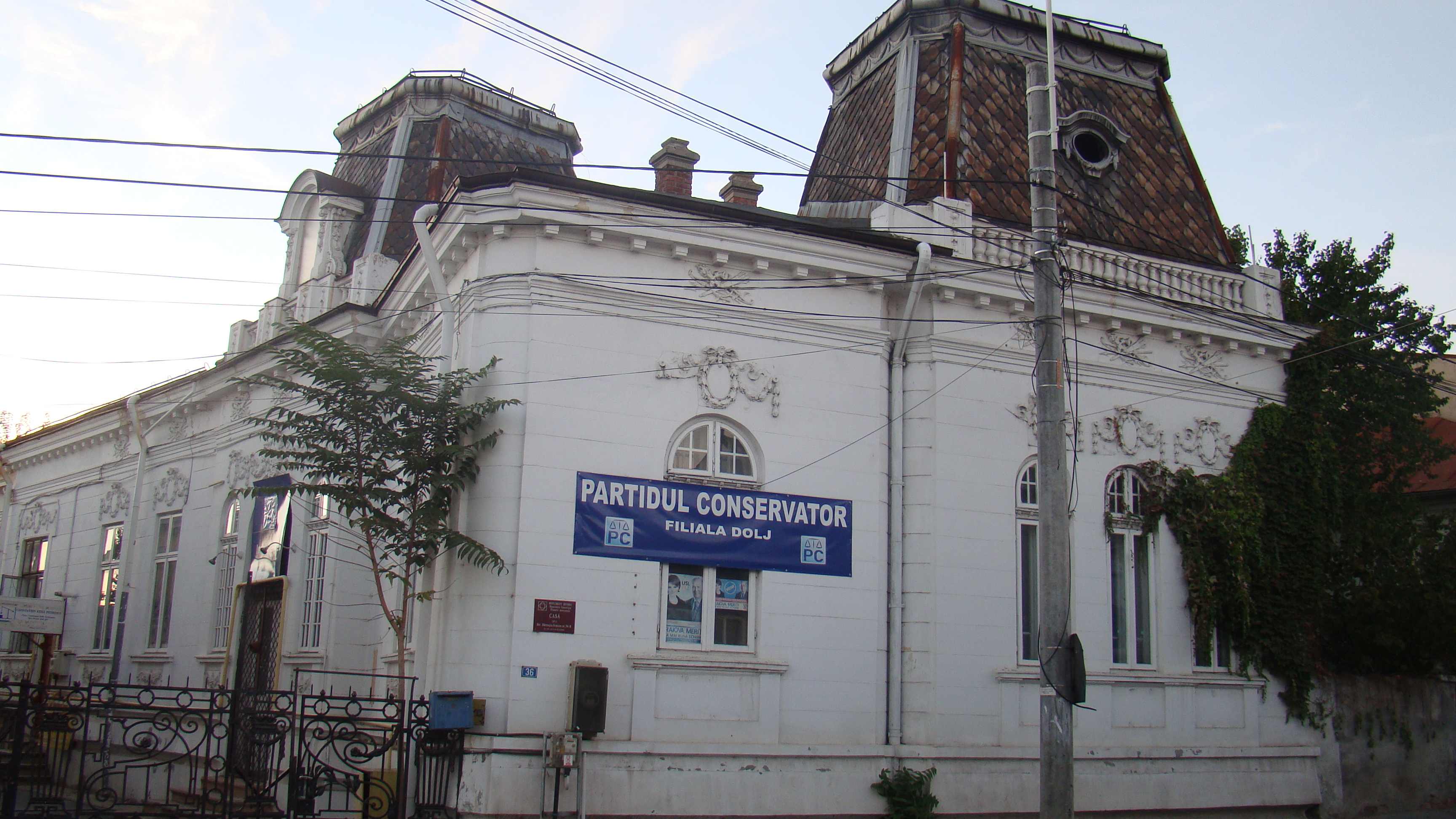 Casă Str. Bărnuțiu Simion 36-B 1911